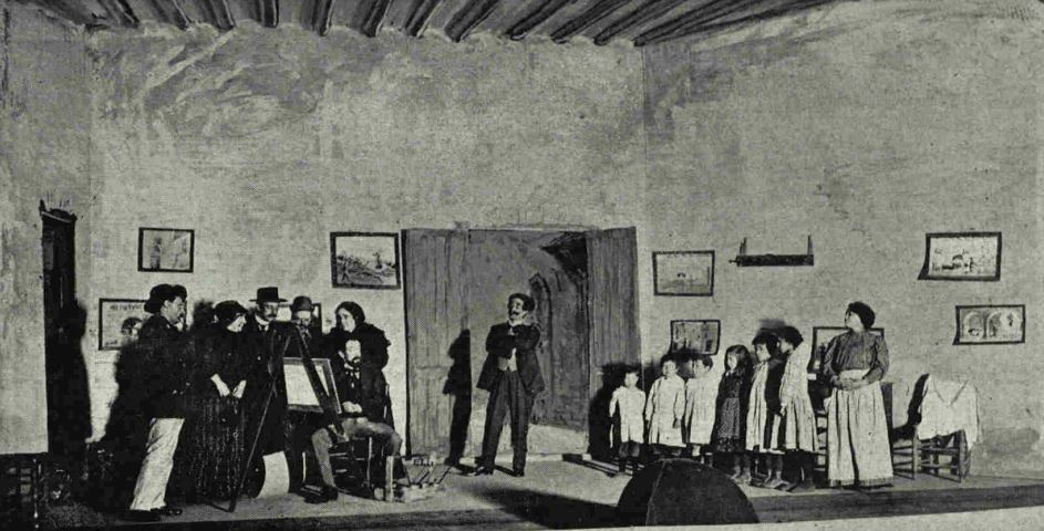 Escena final de l'obra El Pintor de Miracles (1912) de Santiago Rusiñol